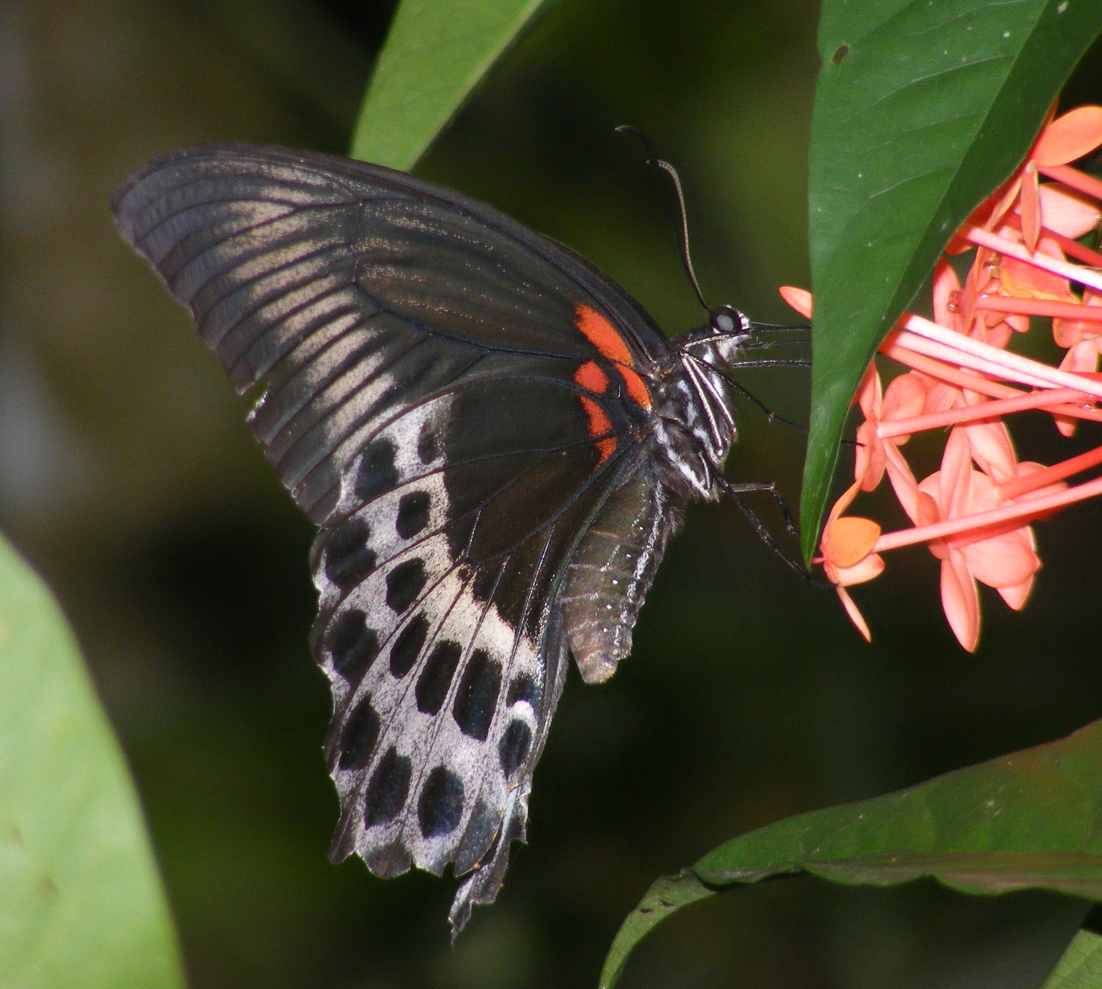 Blue Mormon _Papilio polymnestor